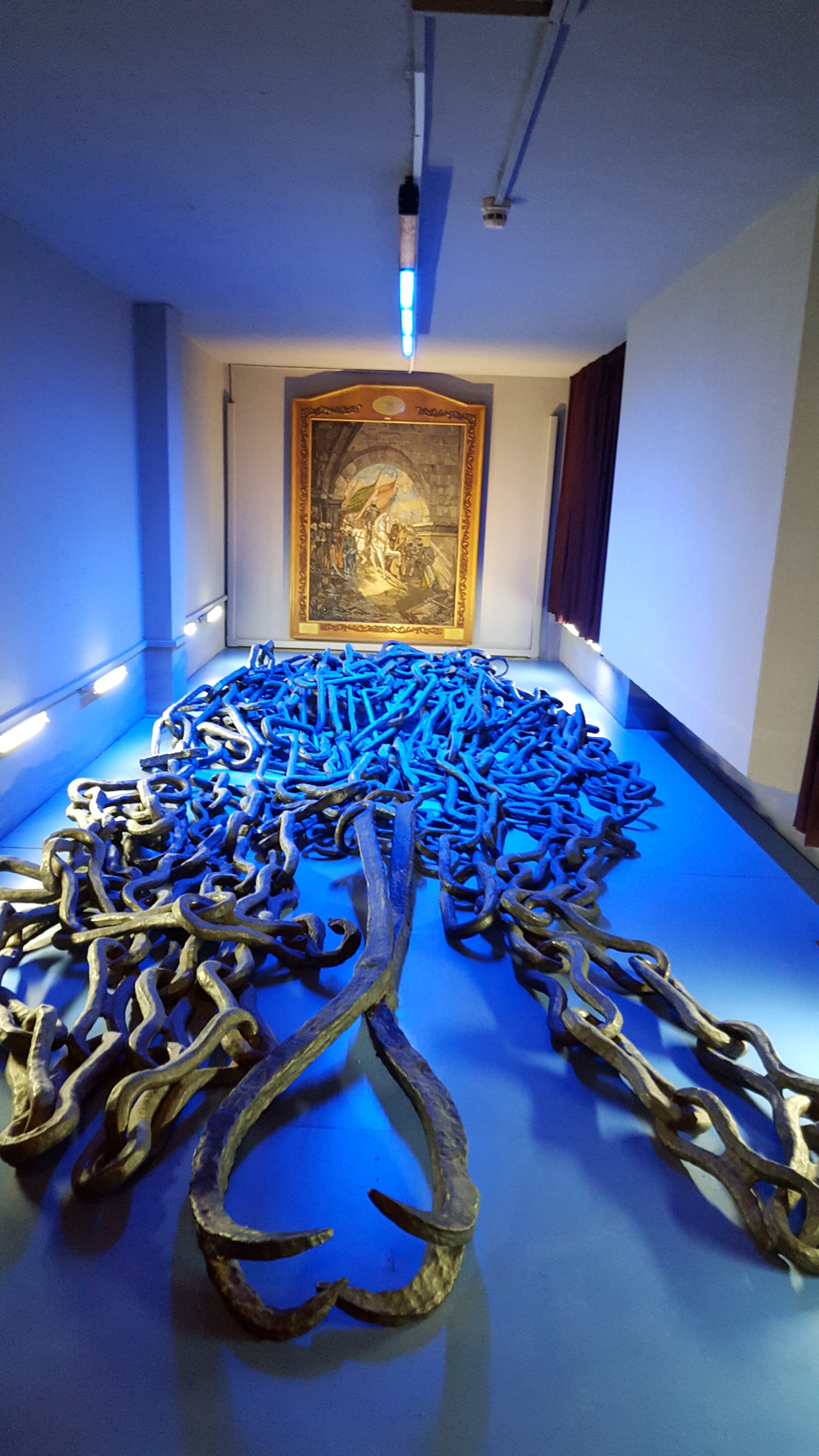 שלשלאות אשר מוקמו מתחת למים בכניסה לעיר קונסטנטינופול למנוע כניסת אוניות מלחמה עות'מאניות.